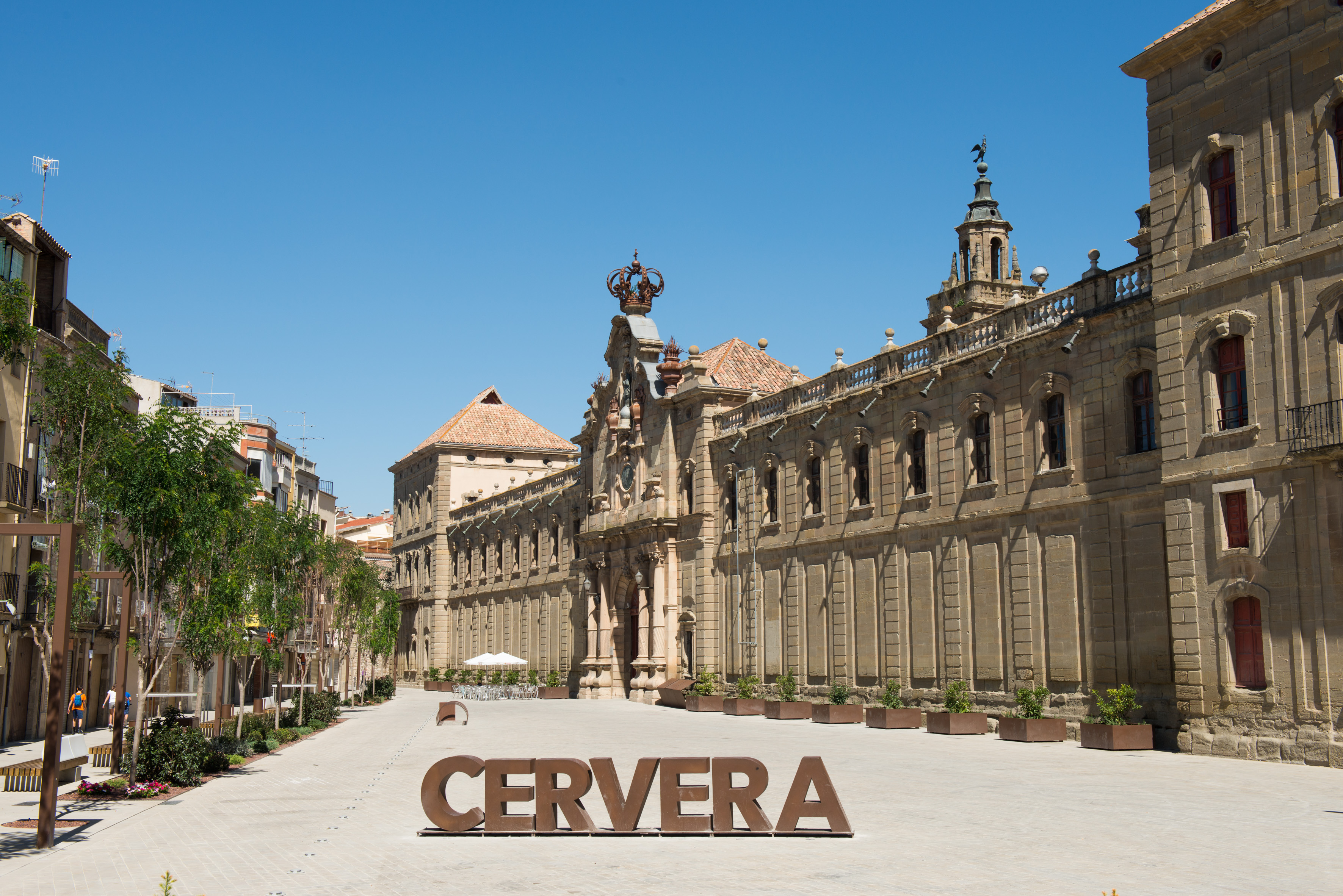 Façana de la Universitat de Cervera. Foto: Jordi Prat